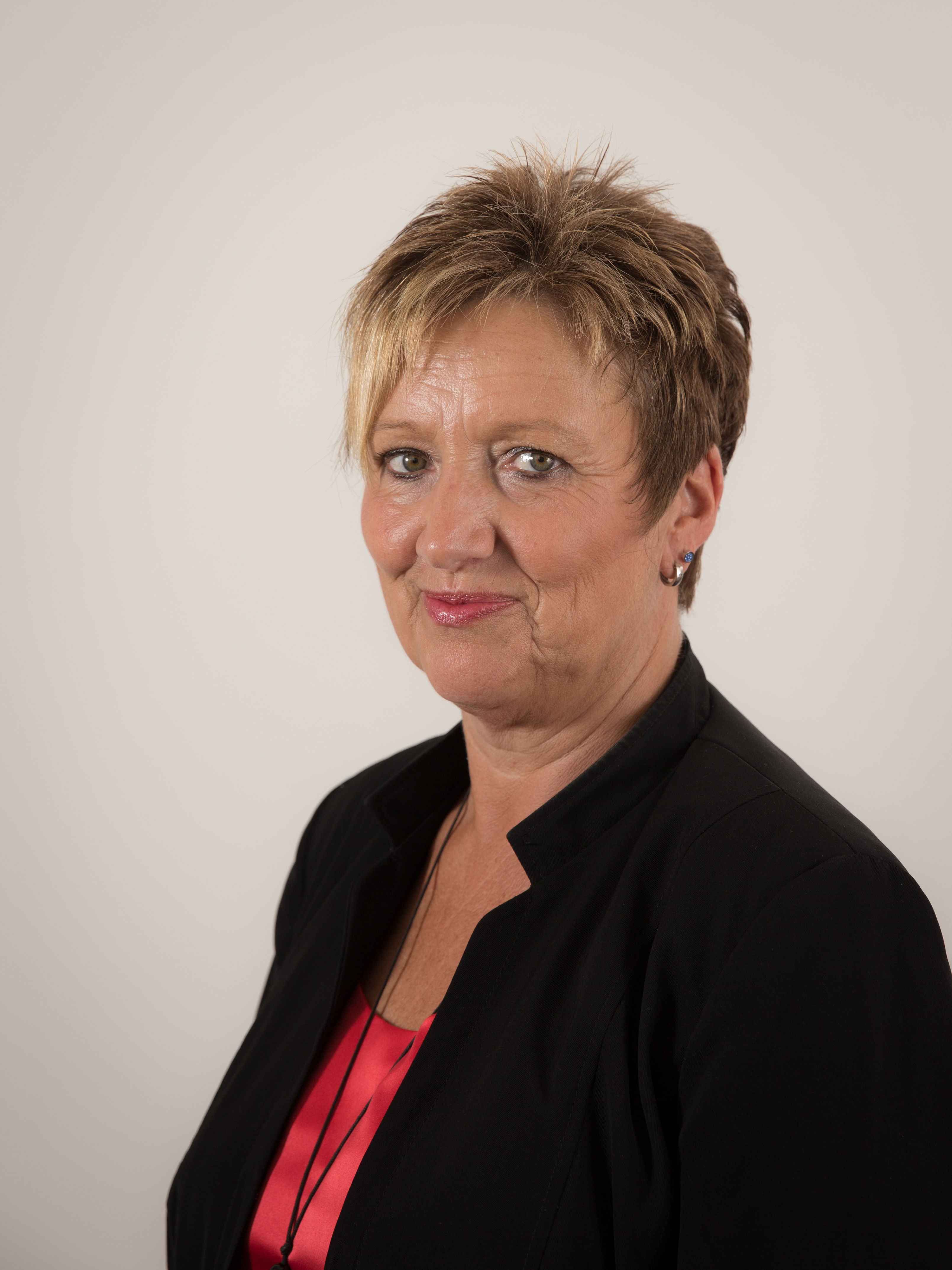 Die saarländische Landtagsabgeordnete Christina Baltes